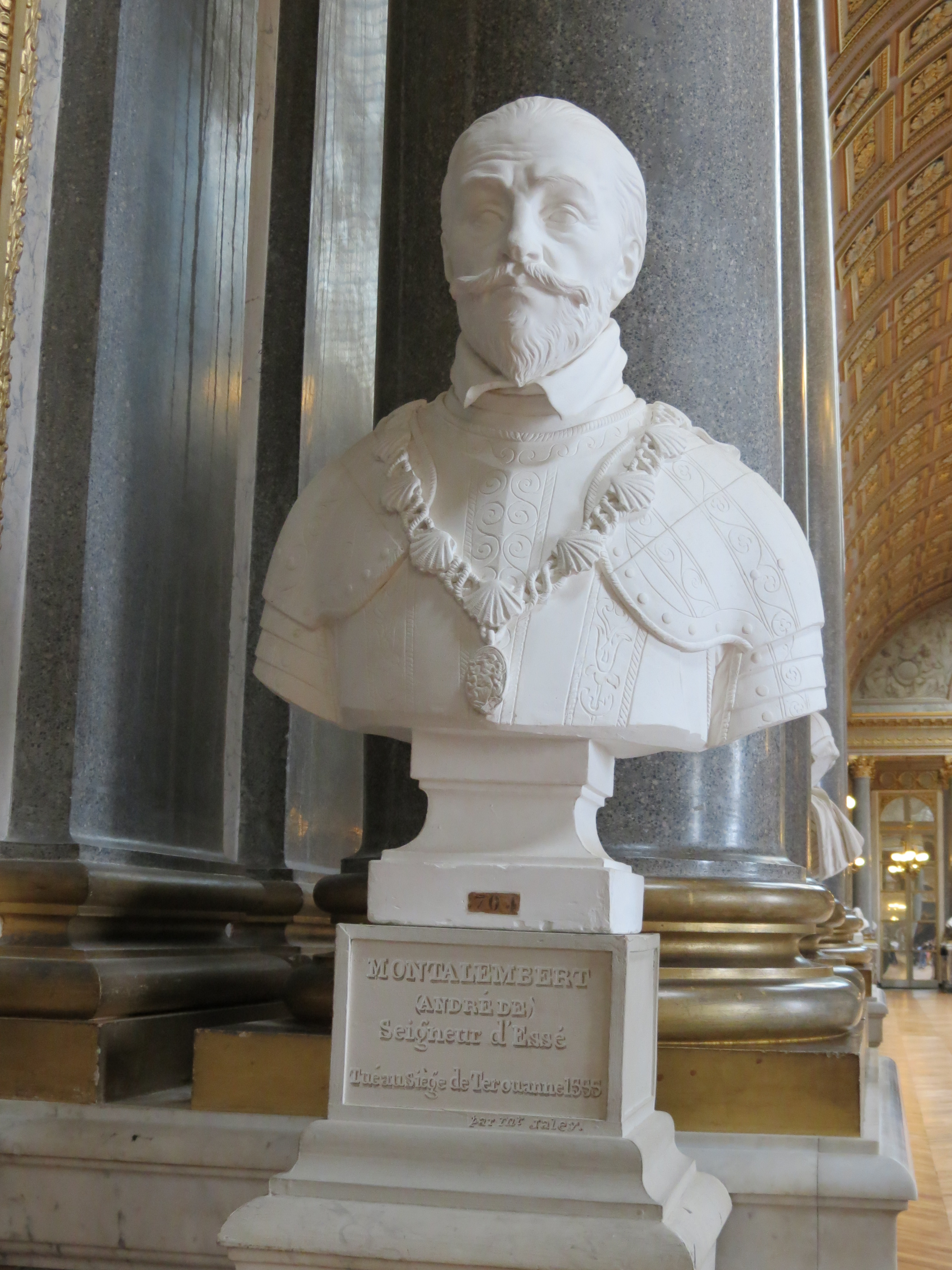 Buste d'André de Montalembert († 1553 et non 1555), seigneur d'Essé, sculpté par Jaley.